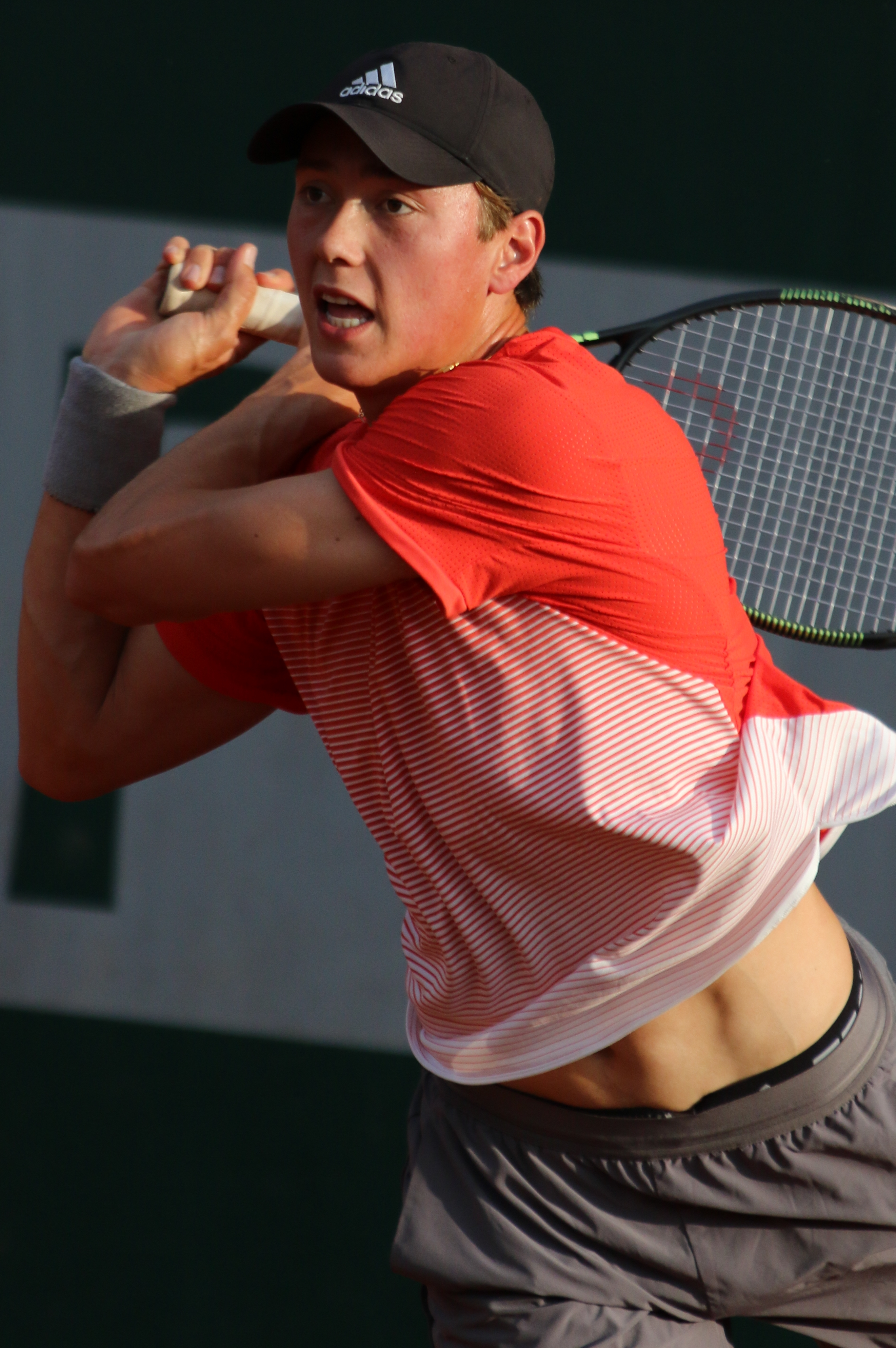 Lakat RG18 (8)